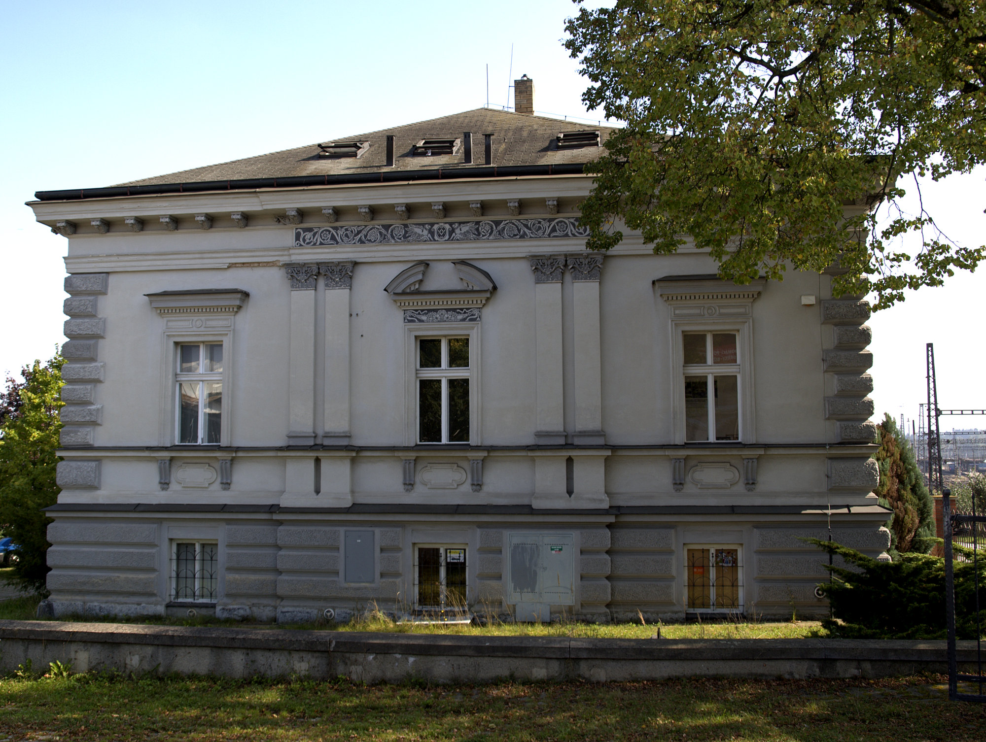 Šupichova vila, Nádražní 128, Havlíčkův Brod.